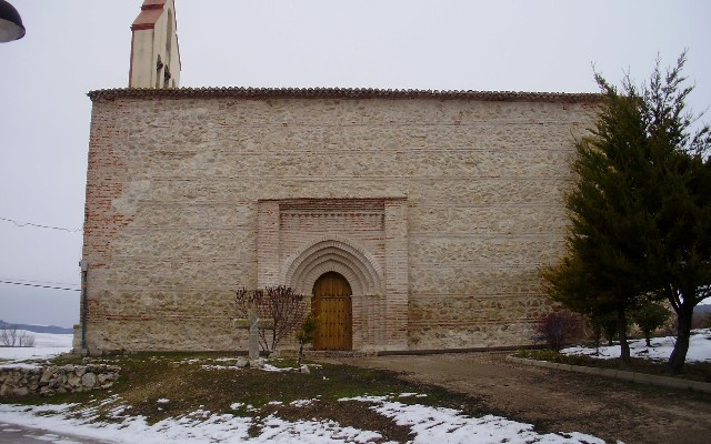 Fachada principal de la Iglesia Parroquial de Villarmntero de Esgueva